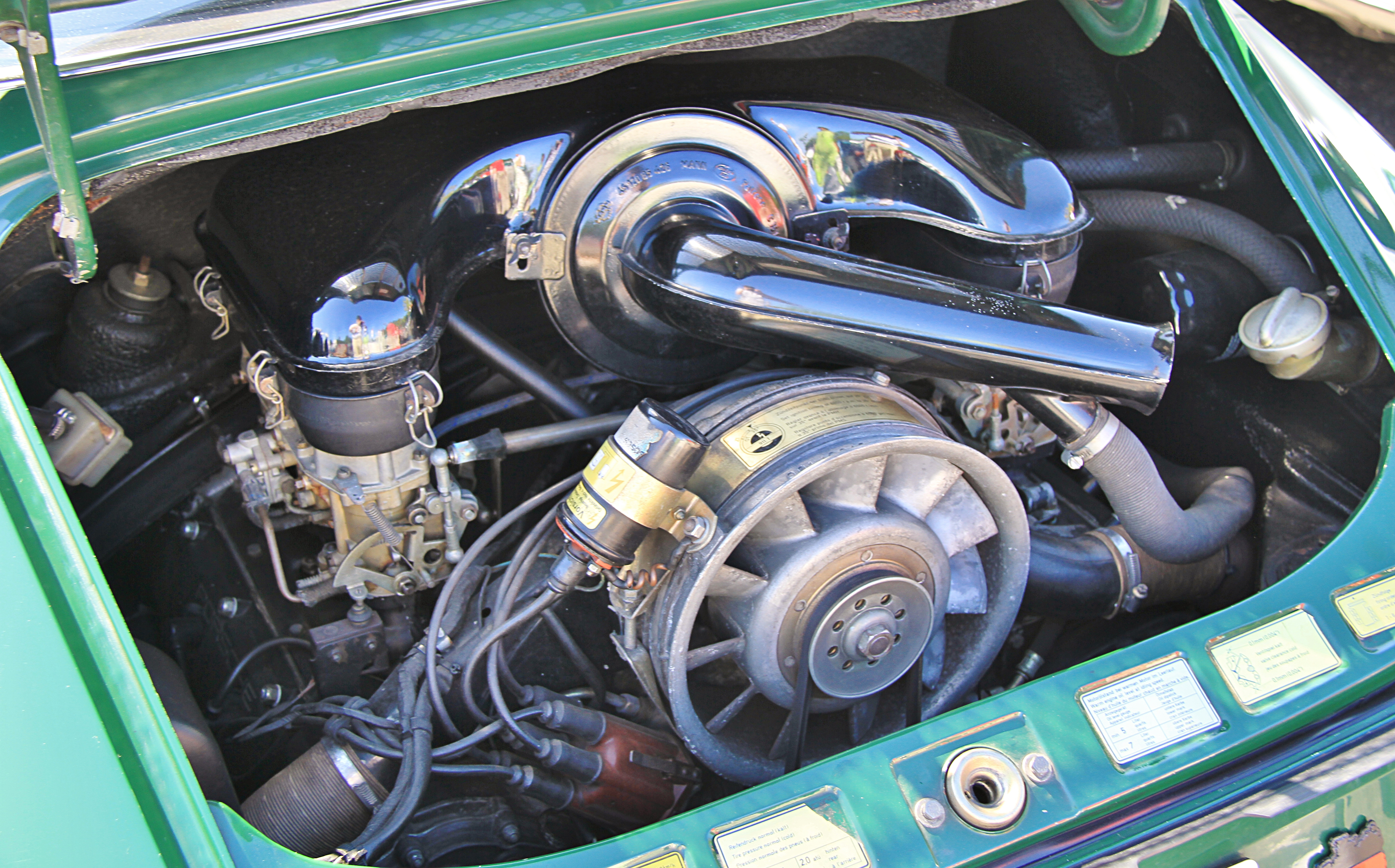 Porsche 901/03 2,195cc engine